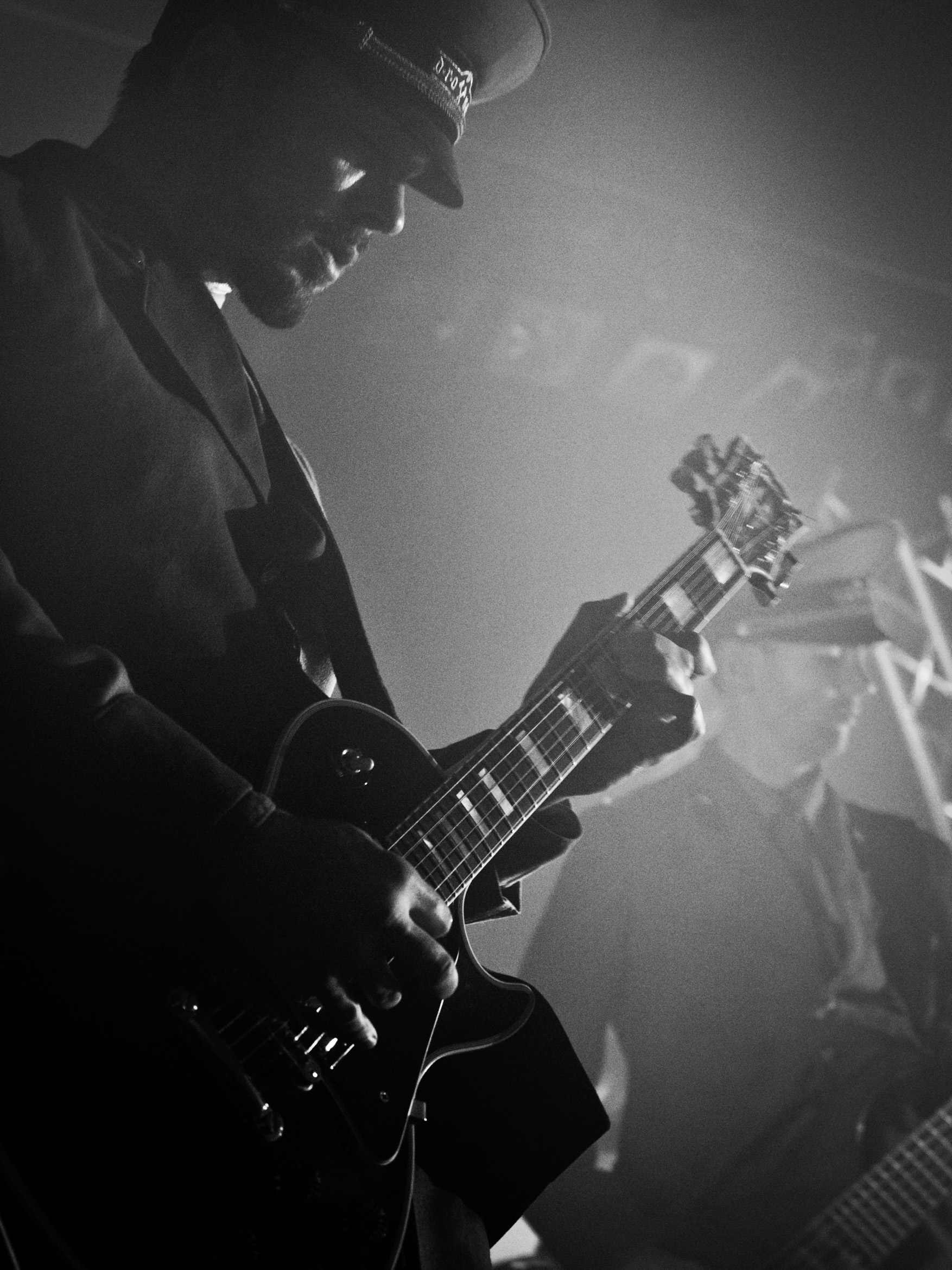 Drottnar au Elements of Rock 2013